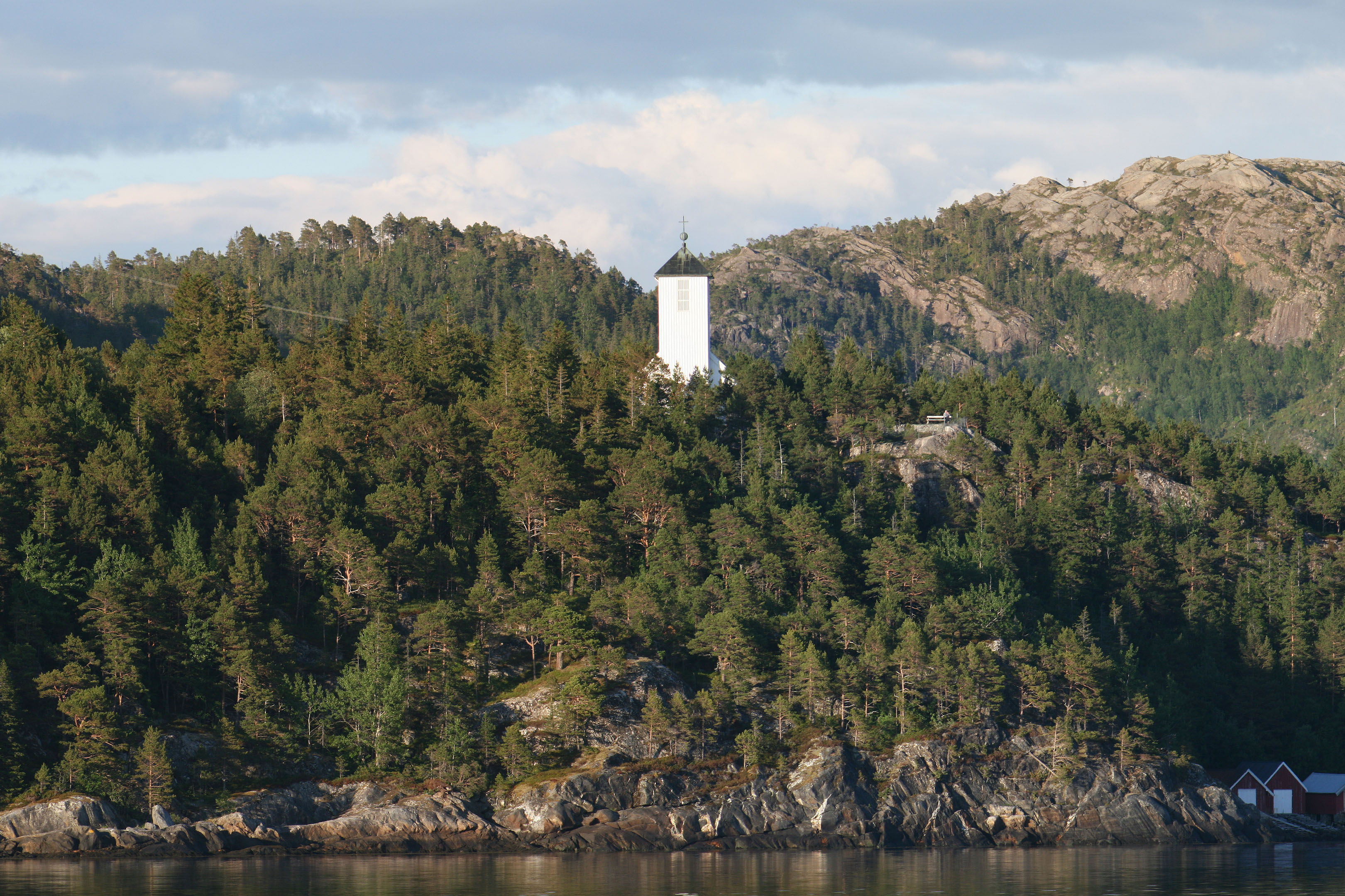 Salsbruket kapell